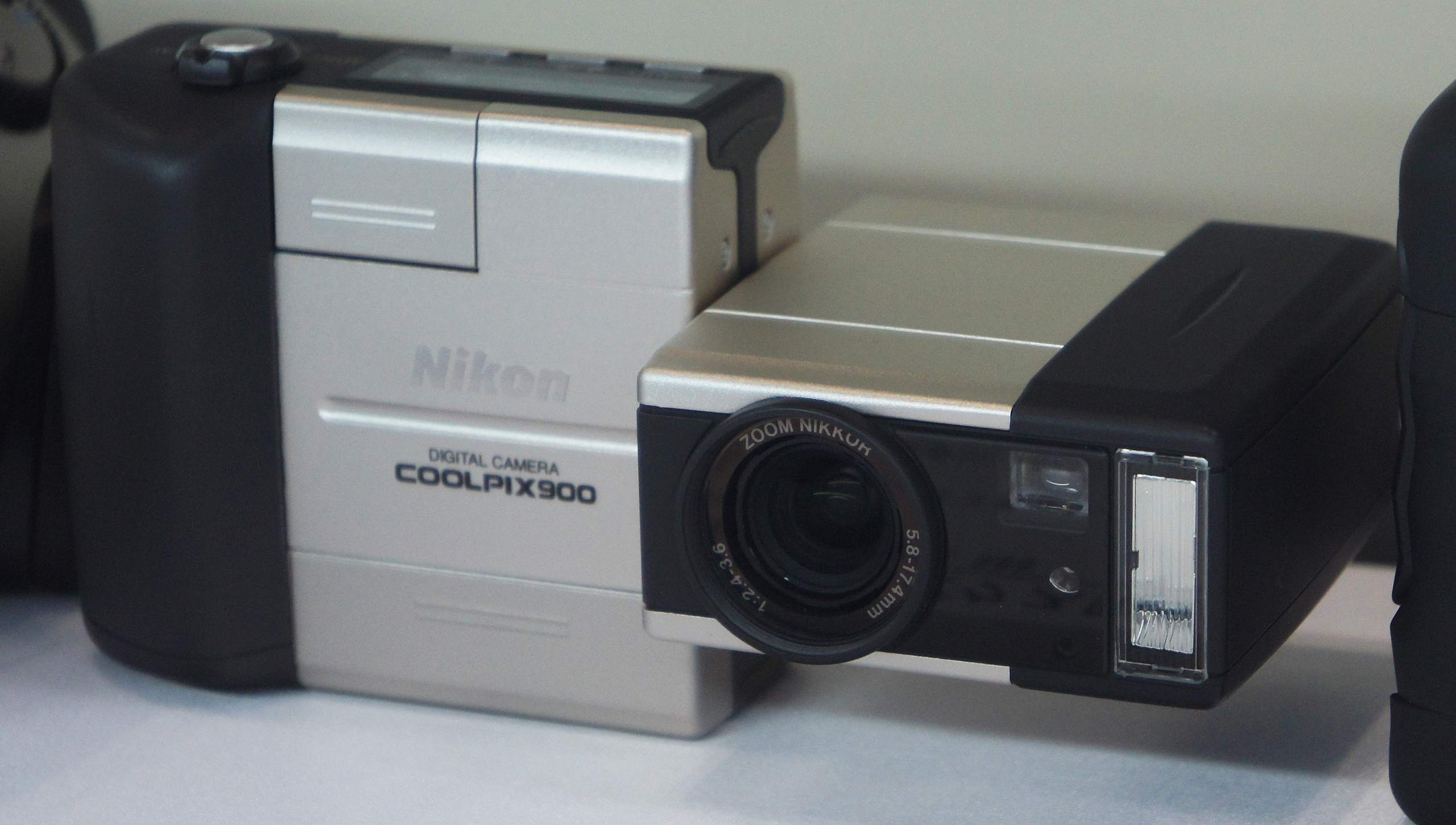 CP+ 2011: 1998 Nikon Coolpix 900